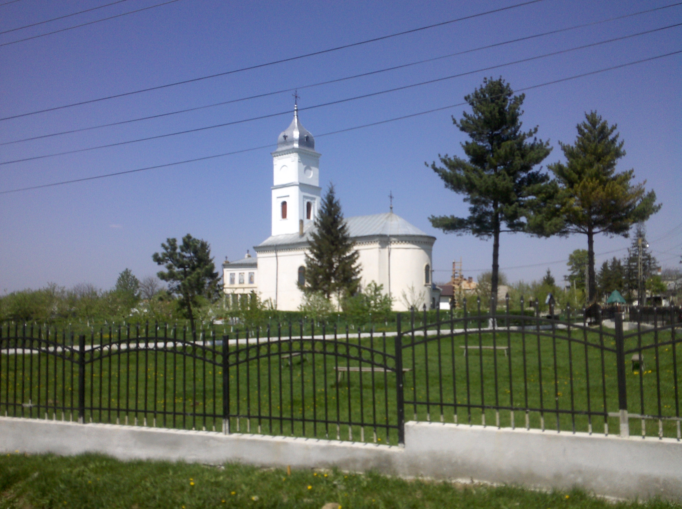 Biserica "Sf. Nicolae"